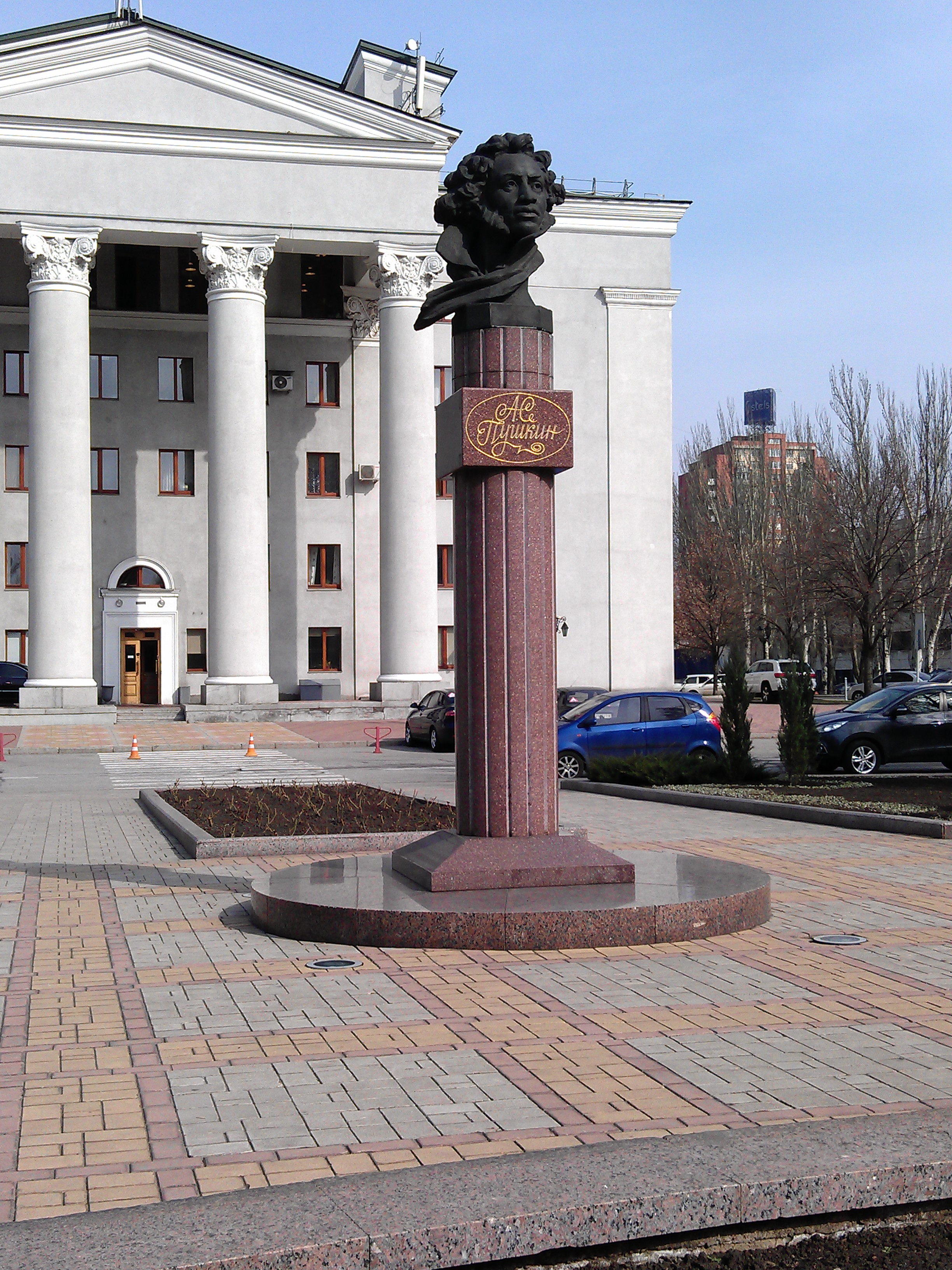 Донецк памятник Пушкину у драмтеатра